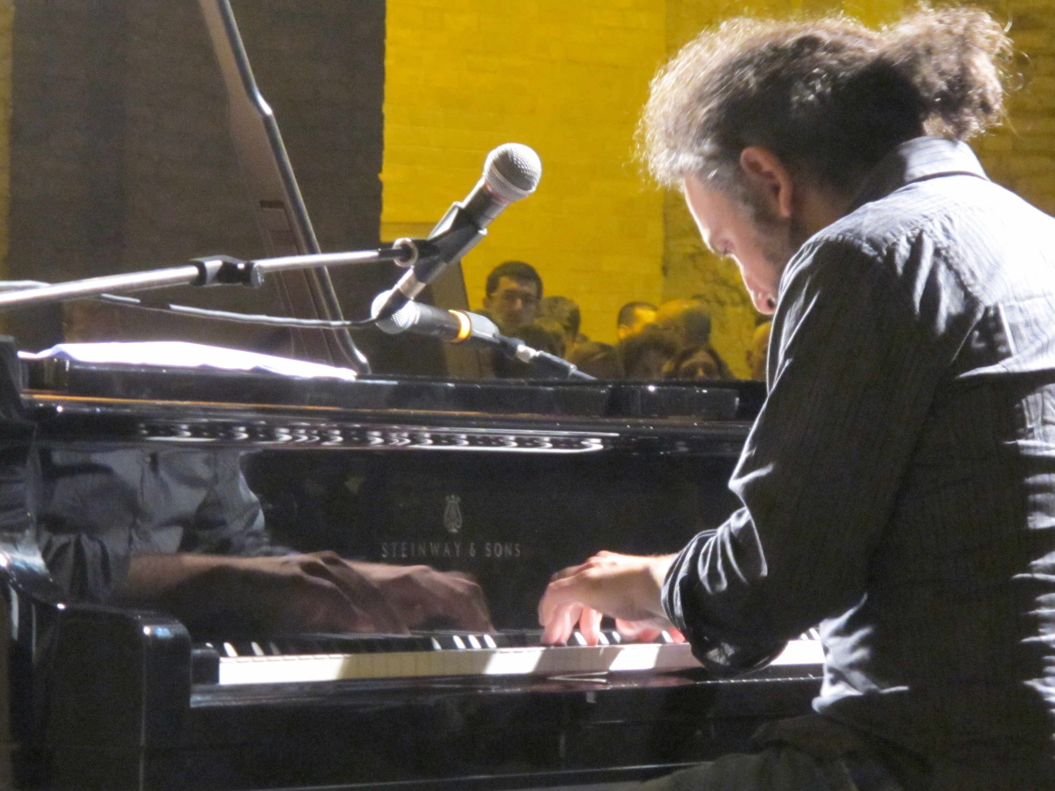 Stefano Bollani al Festival Le Corde dell'Anima di Cremona.